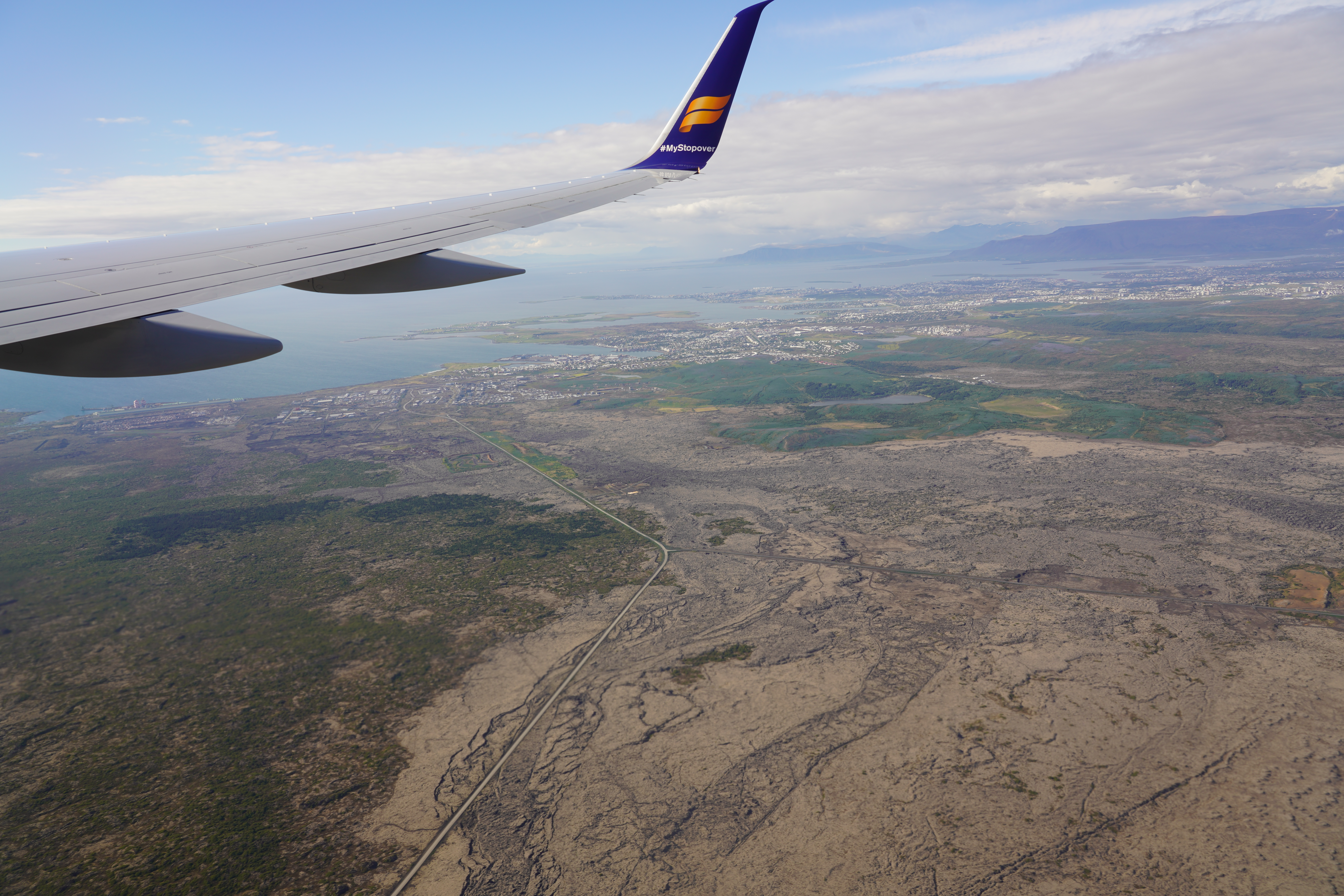 Icelandic aerial-view